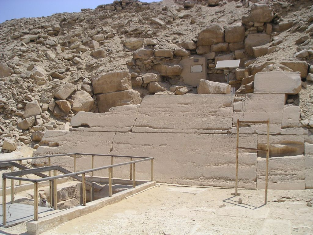 Base de la face nord de la pyramide d'Ounas avec une partie de son revêtement et l'accès aux chambres funéraires souterraines - Saqqarah - Ve dynastie égyptienne